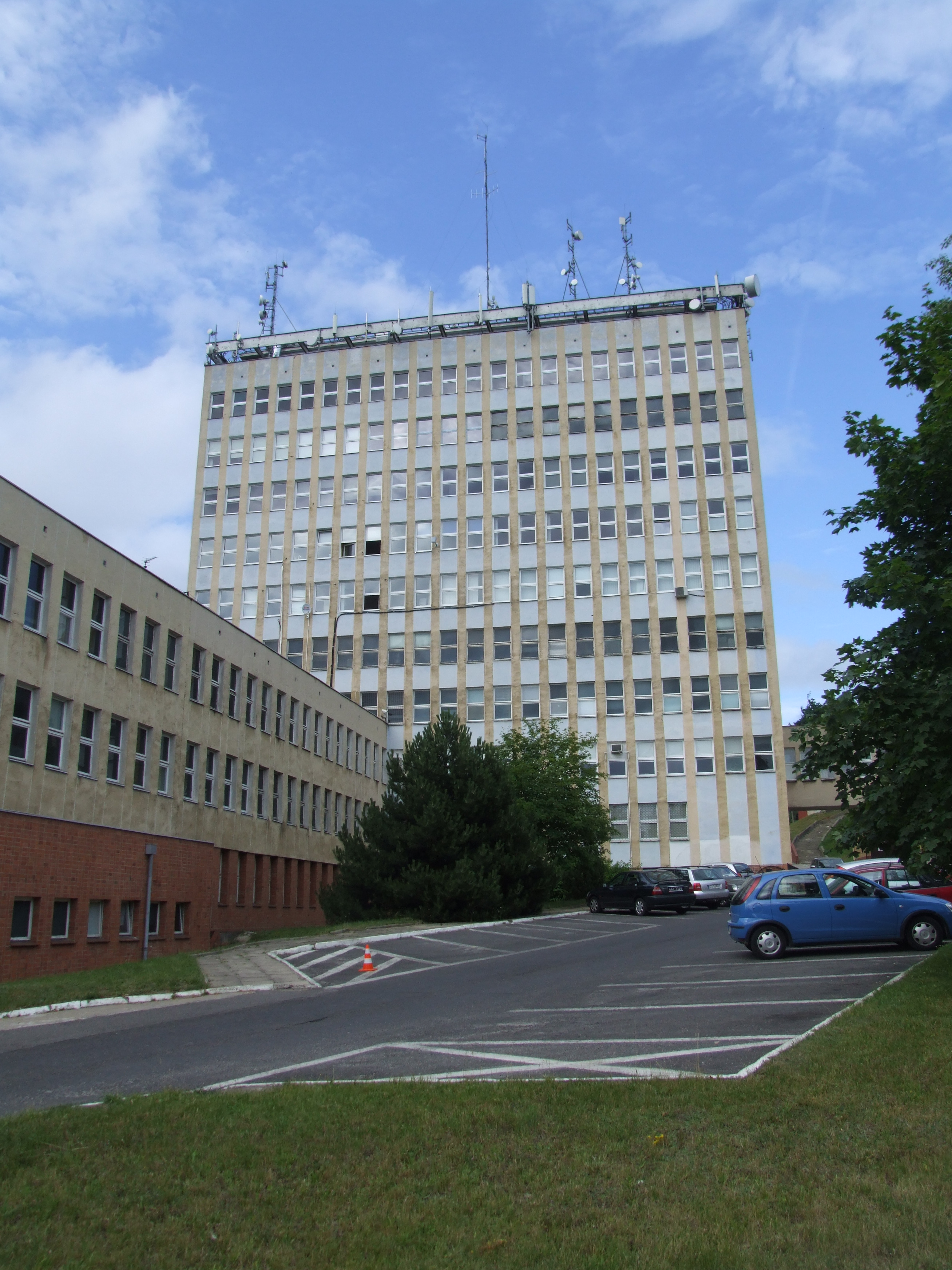 Gdynia - Uniwersysteckie Centrum Medycyny Morskiej i Tropikalnej. Samodzielny Publiczny Szpital Kliniczny Uniwersytetu Medycznego w Gdańsku.